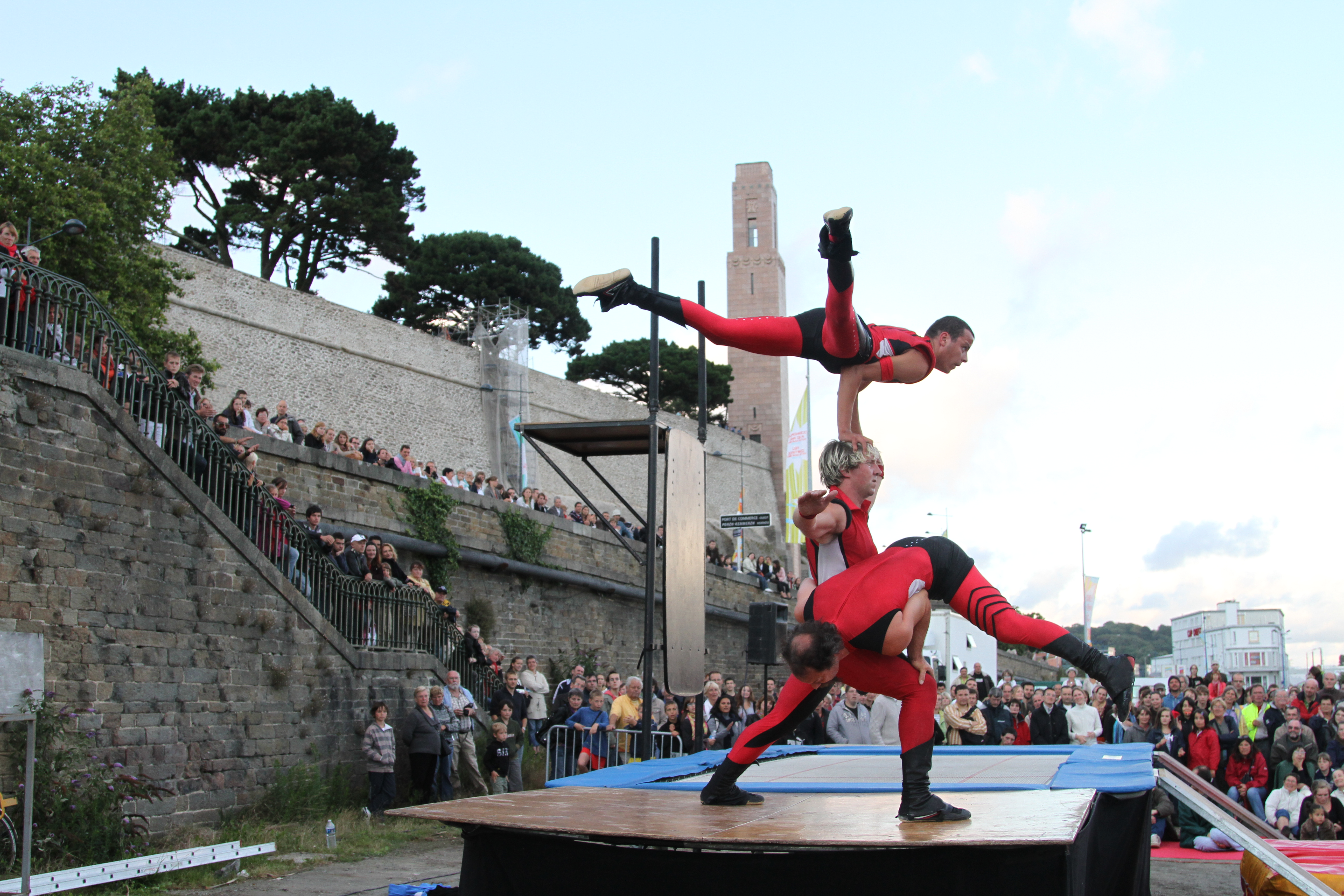 un spectacle d'arts de la rue proposé par le Fourneau aux jeudis du port 2010